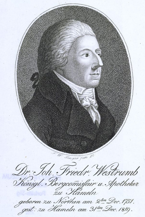 Portrait des Chemikers Johann Friedrich Westrumb (1751–1819), Bildunterschrift: Dr. Joh. Friedr. Westrumb Königl. Bergcommissair u. Apotheker zu Hameln geboren zu Nörthen am 2ten Dec. 1751. gest: zu Hameln am 31ten Dec. 1819.